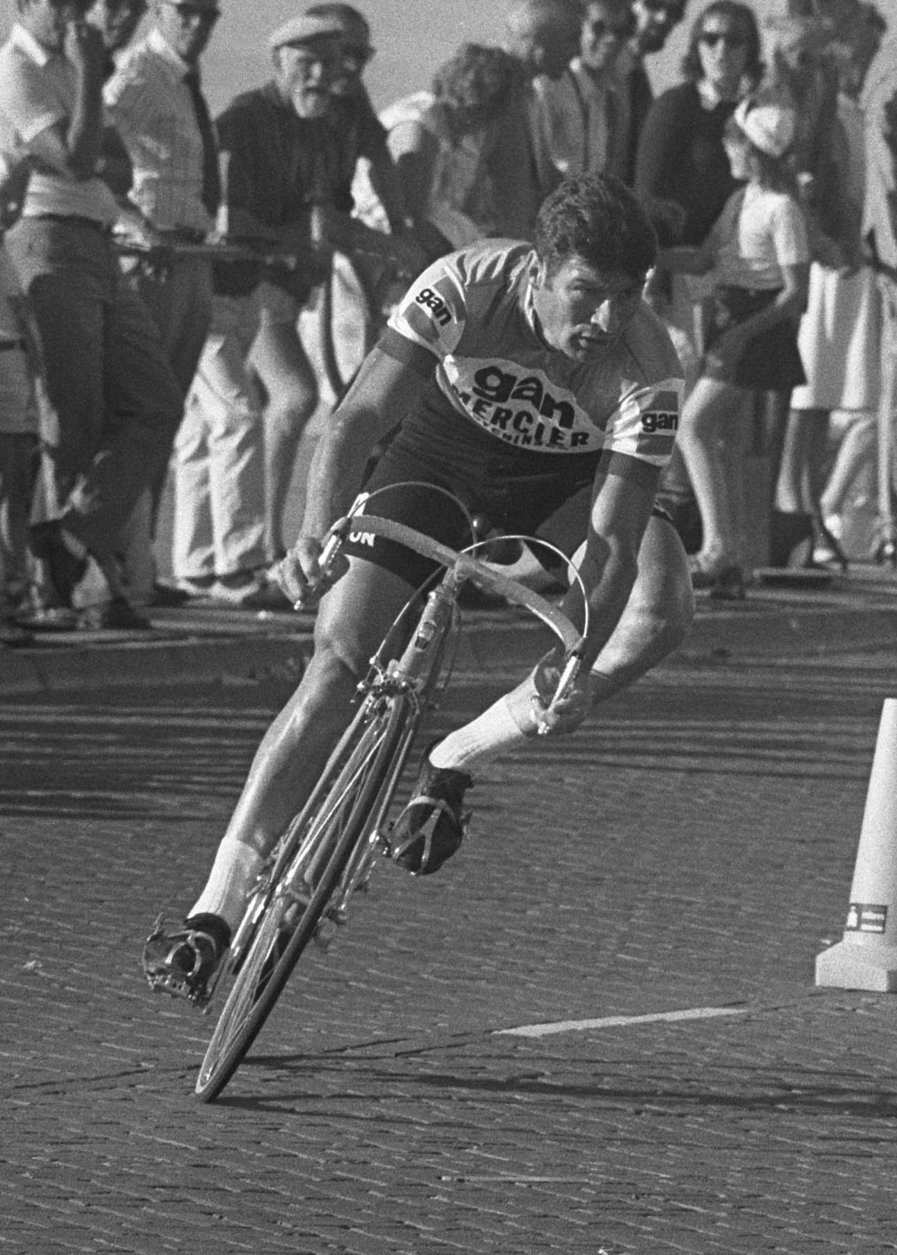 Proloog van Tour de France in Scheveningen, tijdrit, Raymond Poulidor.30 juni 1973